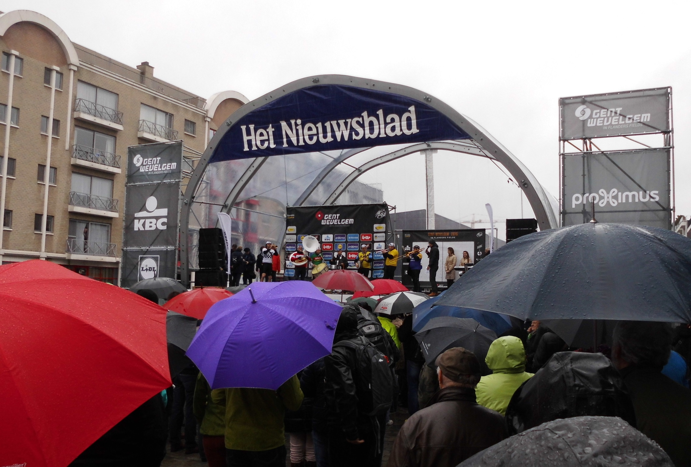 Voorstelling ploegen - Gent-Wevelgem 2015 - Markt - Deinze - Oost-Vlaanderen - België